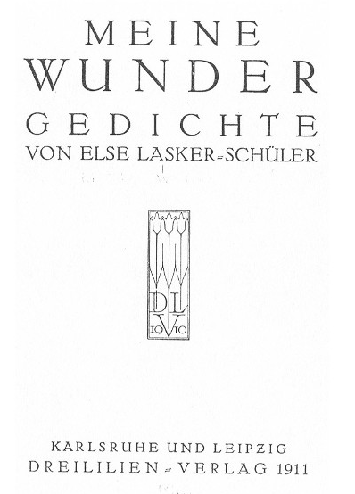 Meine Wunder - Titelbild der Originalausgabe im Dreililienverlag